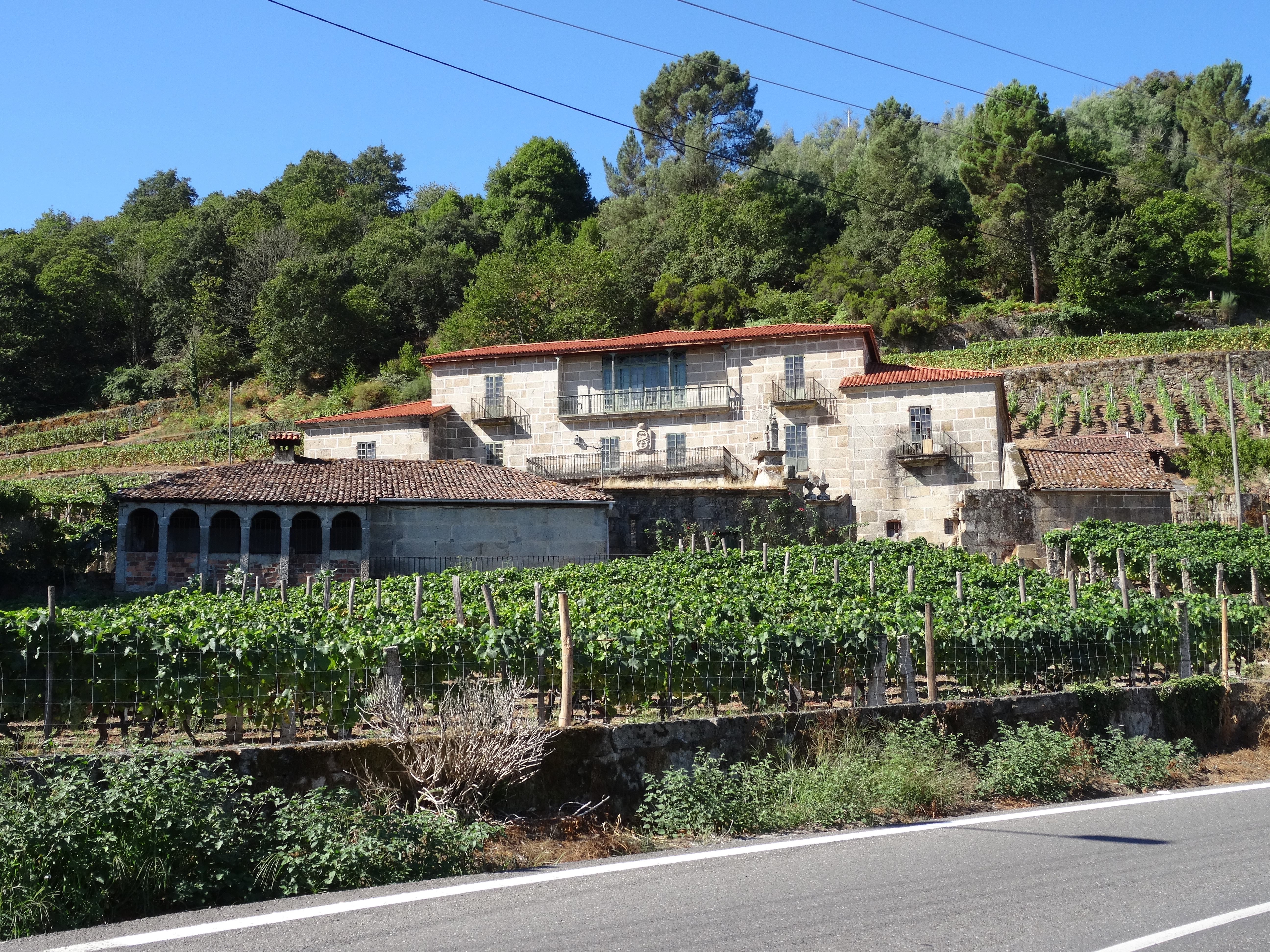 Ver título.